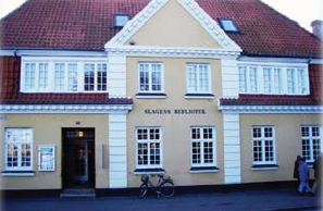 Skagens Bibliotek